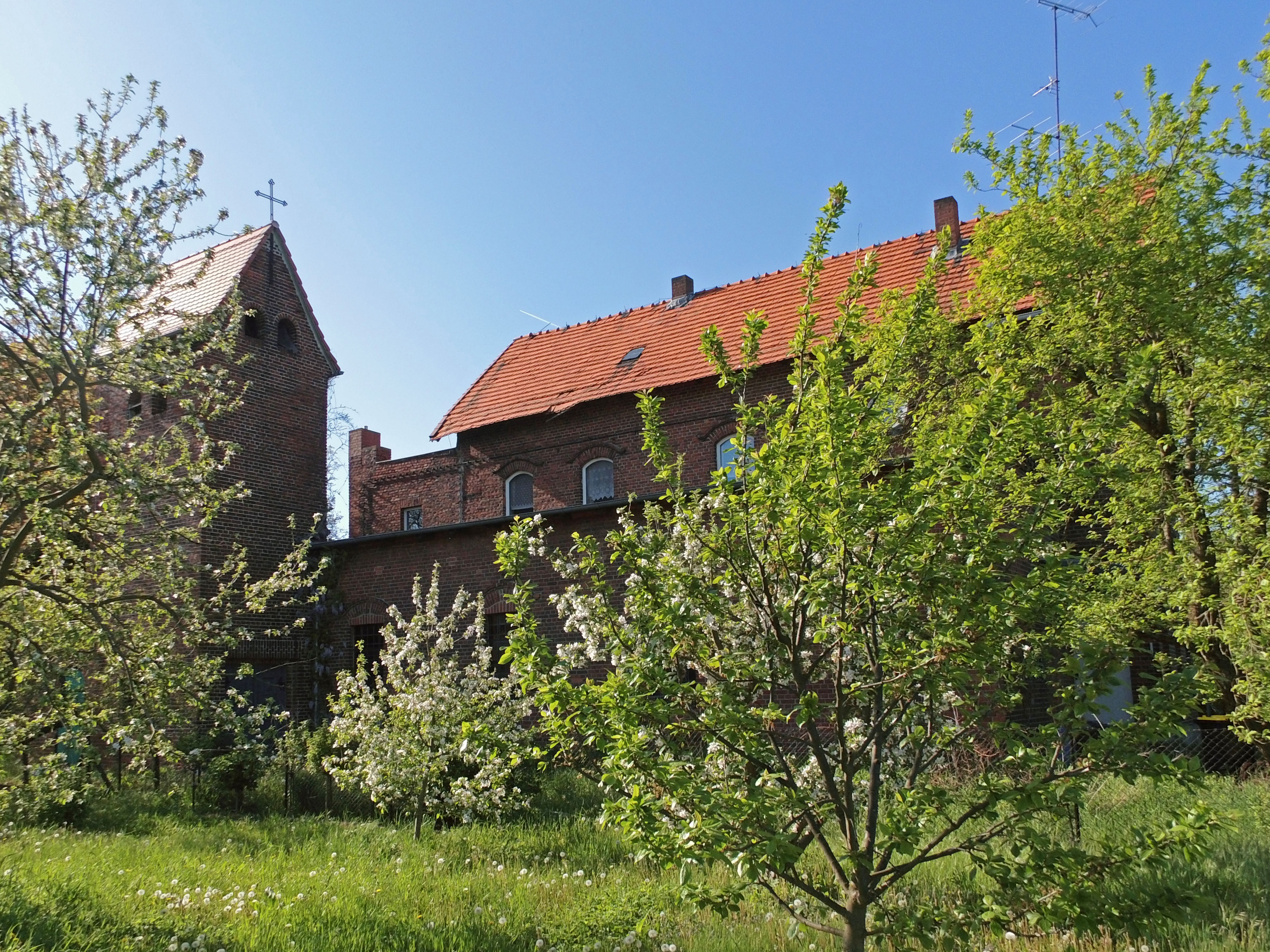 Ehemalige katholische Kirche "Unbefleckte Empfängnis" in Giesenslage (Dekanat Stendal).